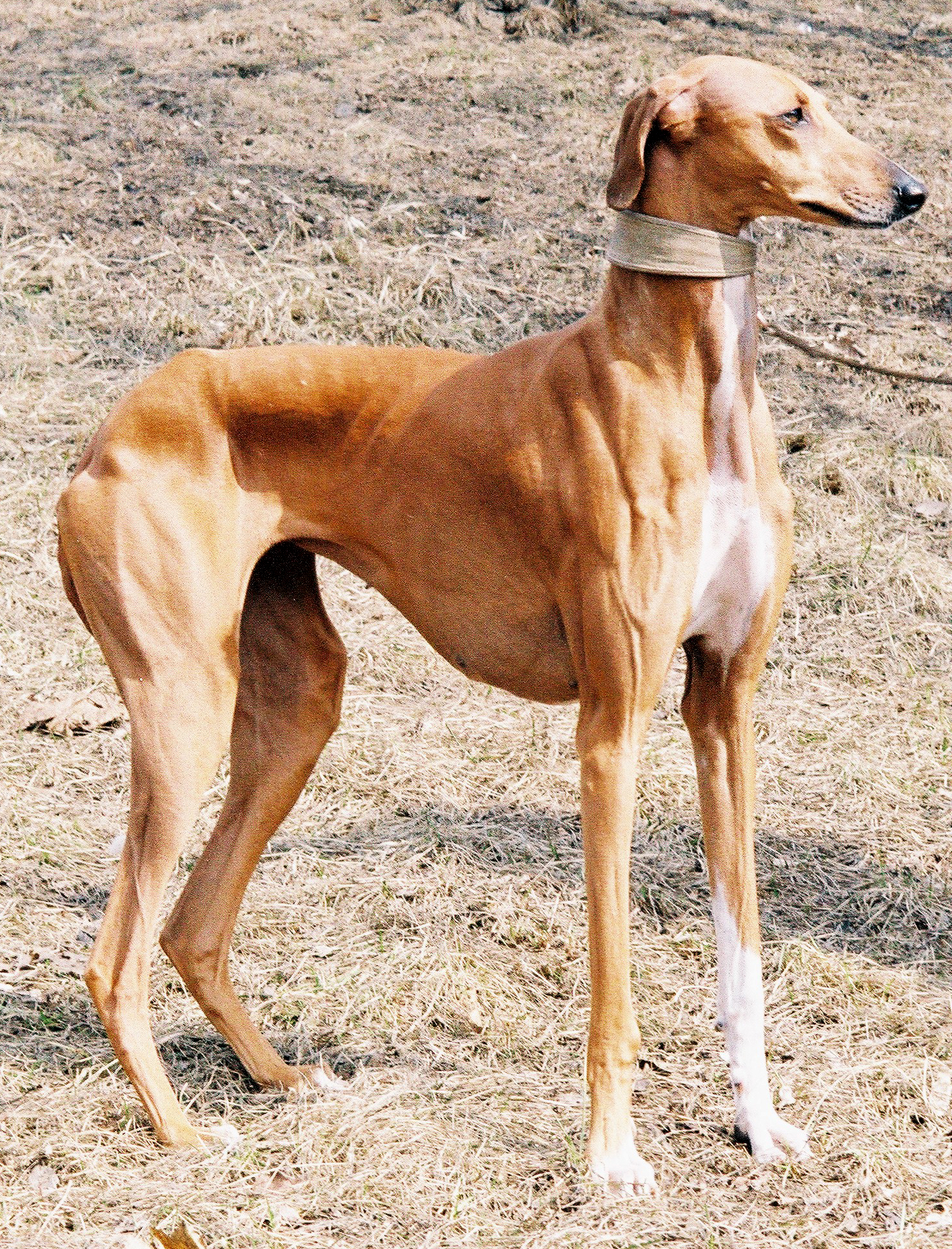 Azawakh na Międzynarodowej Wystawie Psów Rasowych w Katowicach, 03.2006 autor: Pleple2000 19:39, 4 April 2006 (UTC)